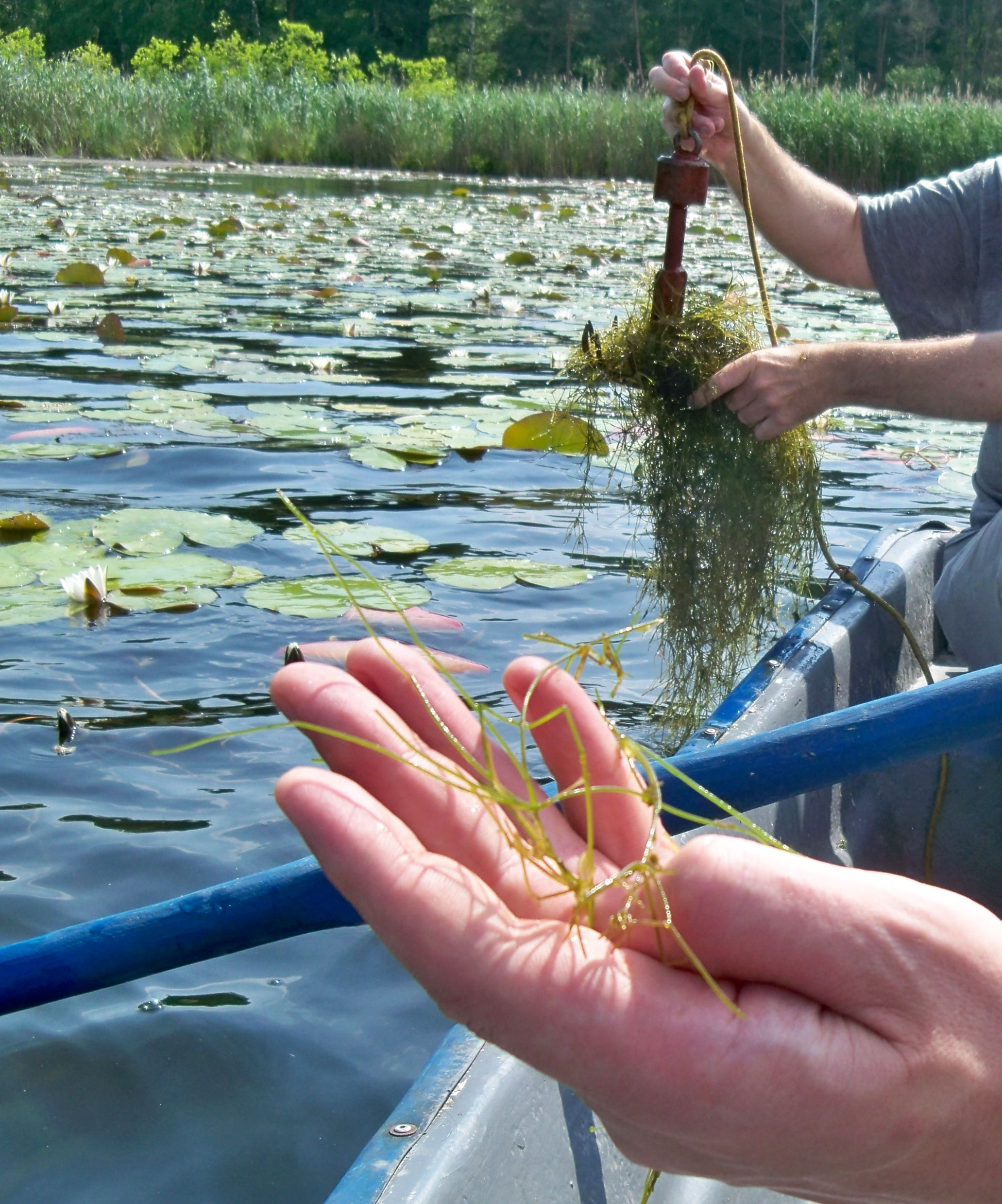 Krynicznica tępa (Nitellopsis obtusa) z Jeziora Wielkowiejskiego (Wielkopolski Park Narodowy)